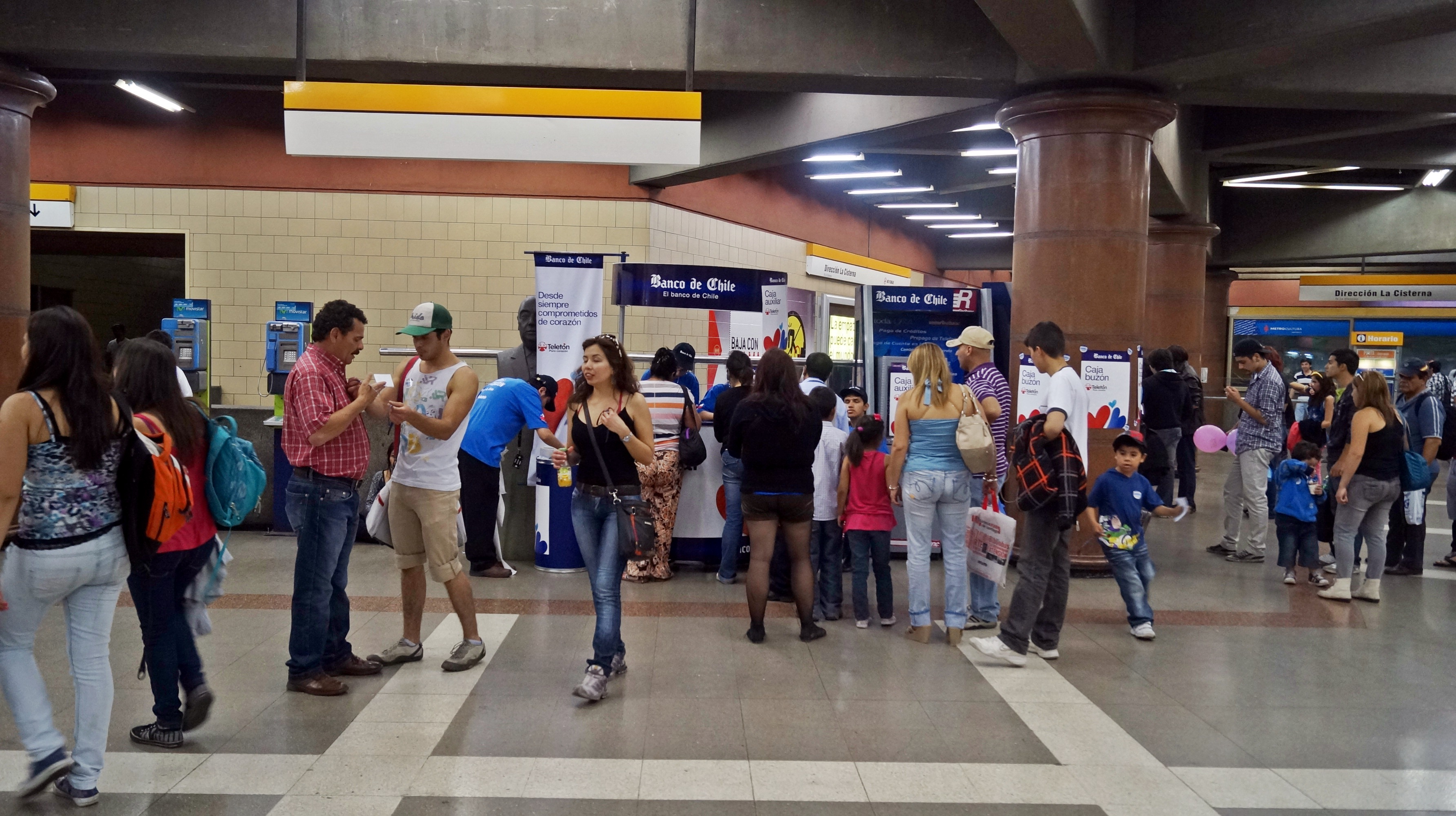 Caja Auxiliar en la estación del Metro de Santiago Cal y Canto para la Teletón 2012 en Chile